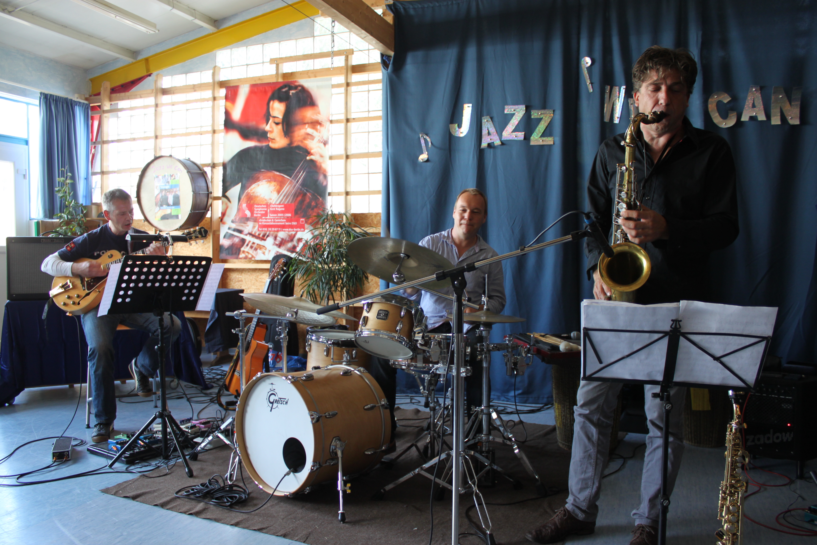 Rüdiger Ruppert (am Schlagzeug) mit Thomas Andelfinger (Gitarre) und Falk Breitkreuz (Saxophon) im Jazz We can in Bad Marienberg (Westerwald) August 2011